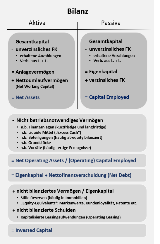 Abgrenezungen Assets